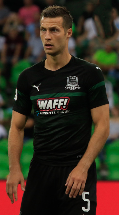 «Железнодорожник» Смолов снова в Краснодаре. Как это было